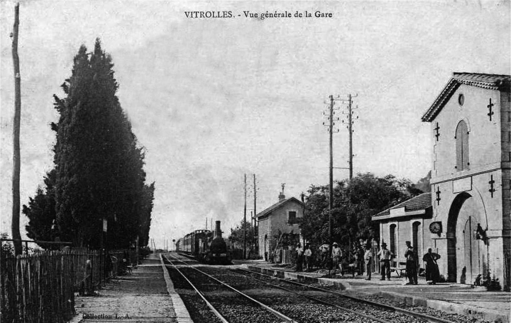 La gare de Vitrolles, arrivée d'un train à vapeur, quais voies et bâtiment voyageurs